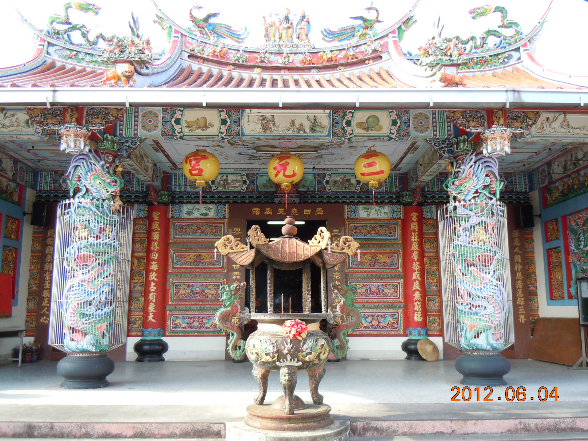 中文（台灣）: 三元宮位在臺中市潭子區東寶里民族路一段312巷26弄1號。